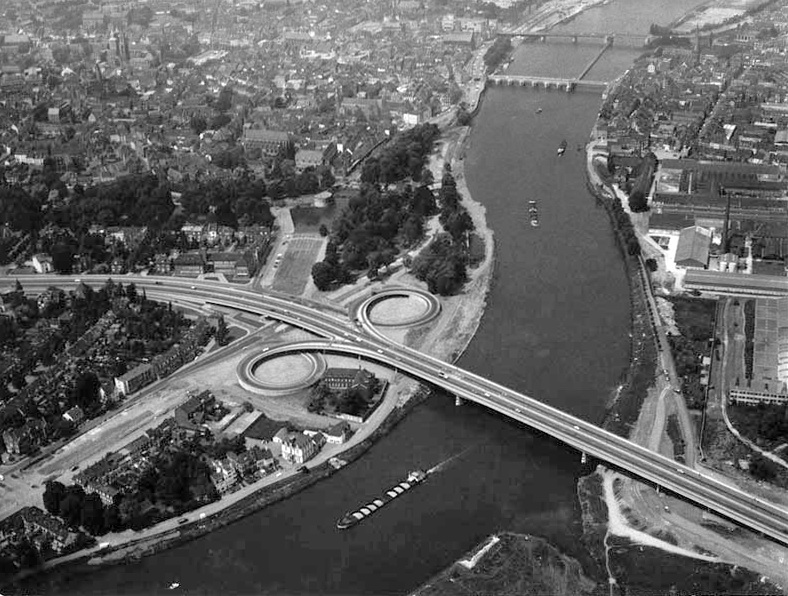 Luchtfoto van de Maas en de John F. Kennedybrug in Maastricht in 1969. Fotocollectie RHCL Maastricht, GAM 13564.